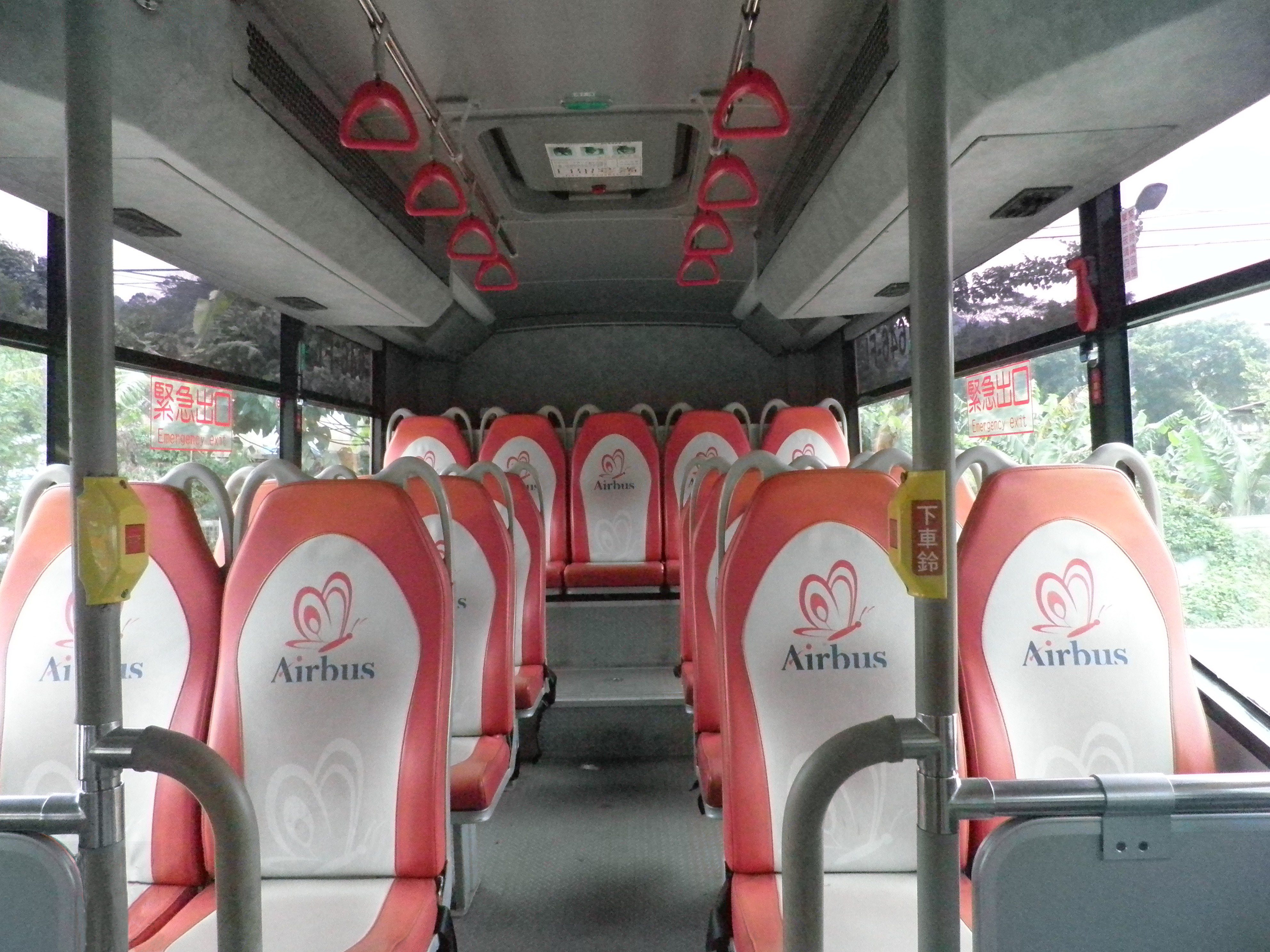 大有巴士2006年三菱扶桑大客車646-FL內裝後半段 可見大有巴士第四代(蝴蝶)商標